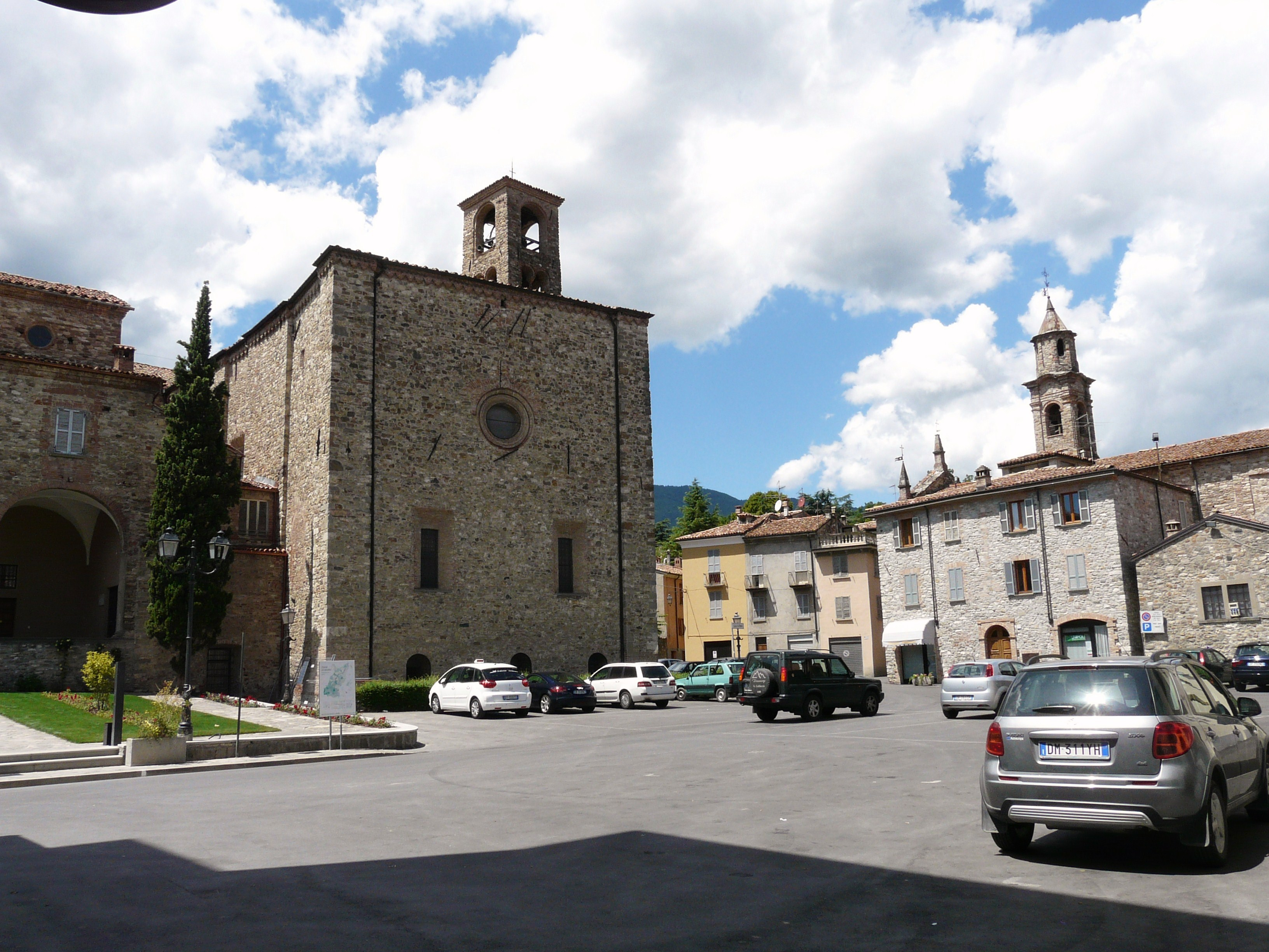 Immagini dell'abbazia di San Colombano di Bobbio, Emilia-Romagna, Italia